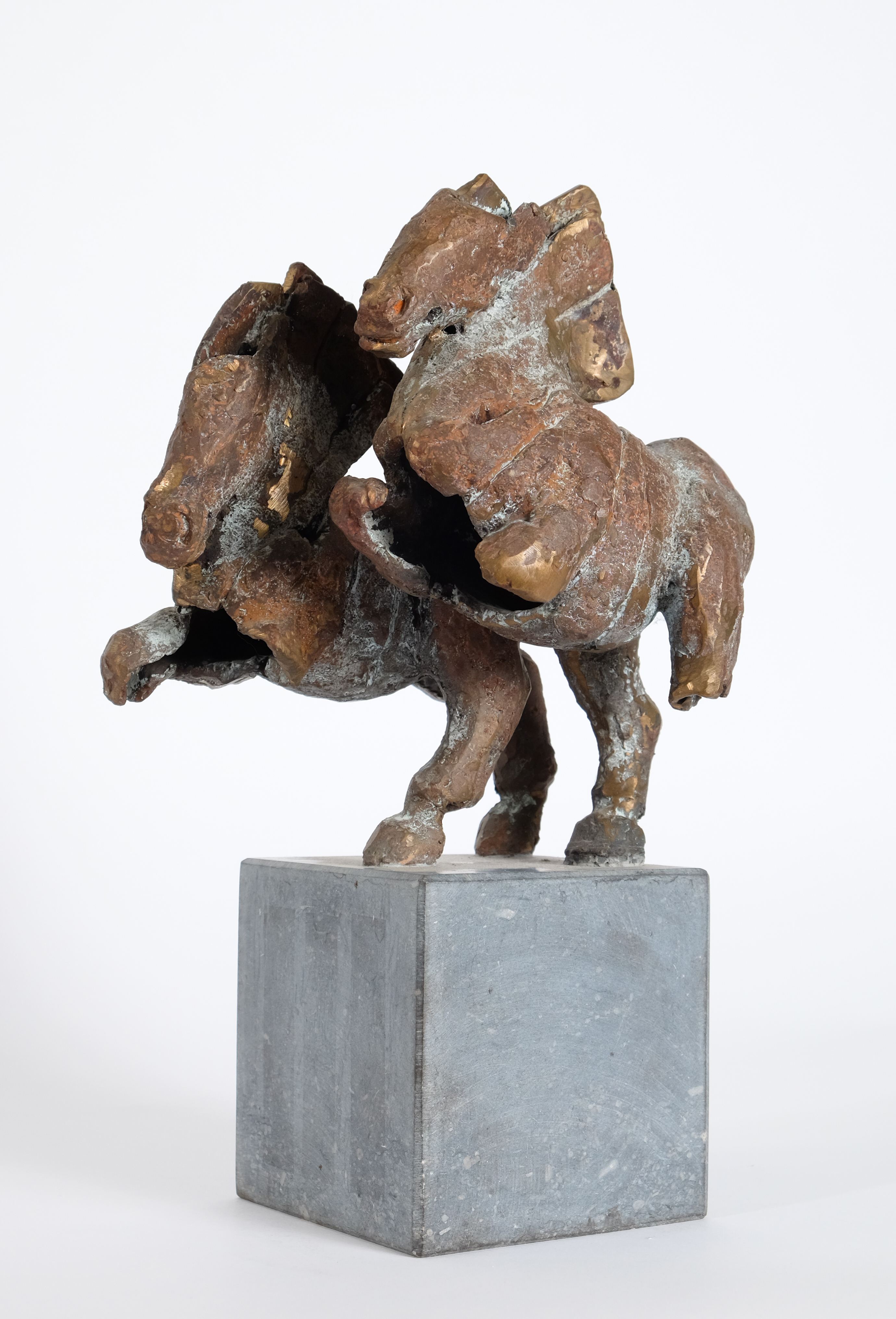 Wisseltrofee Ut Peerd